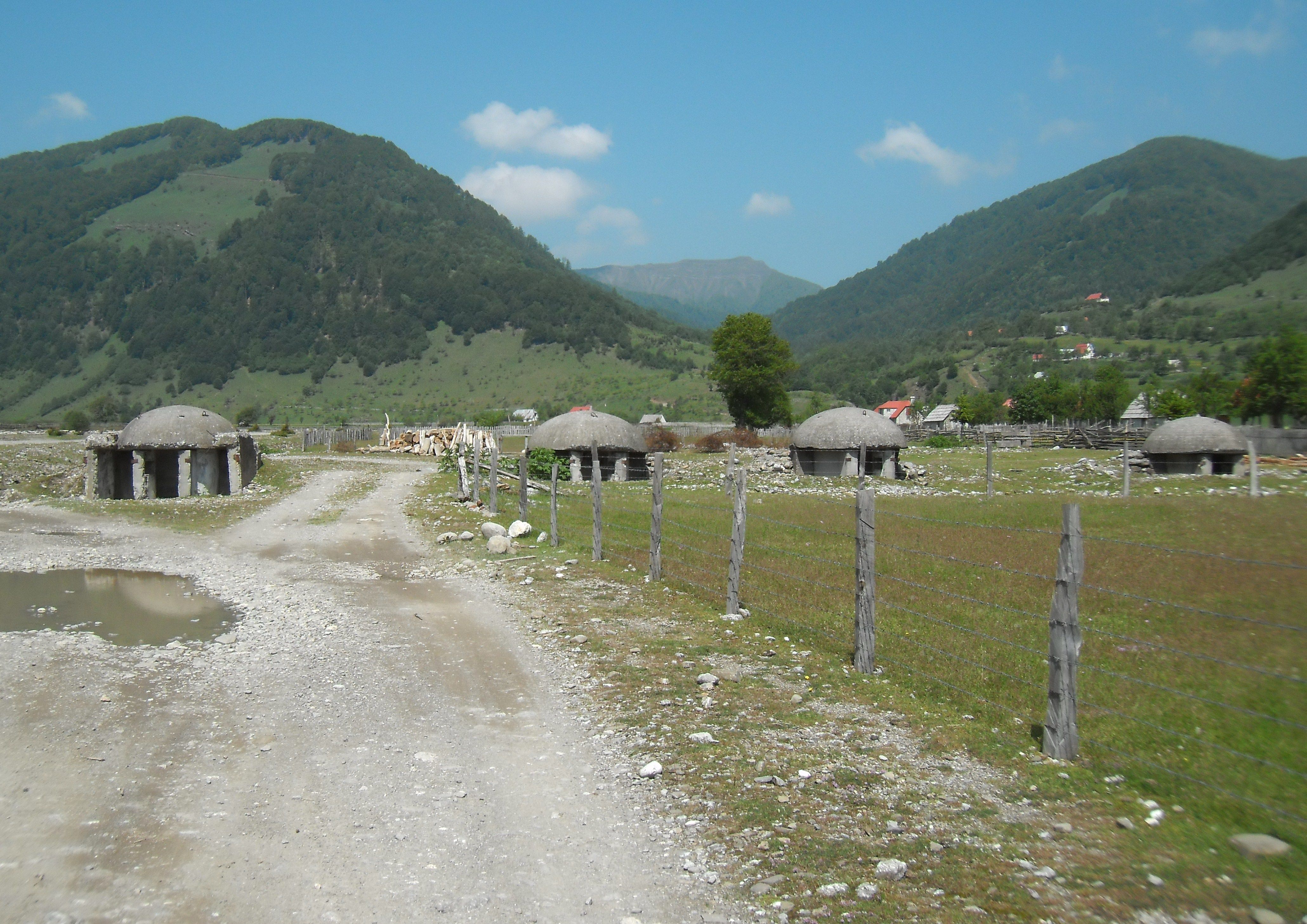 Die typischen Ein-Mann-Schützenbunker aus alten Kriegszeiten in Vermosh, Albanien